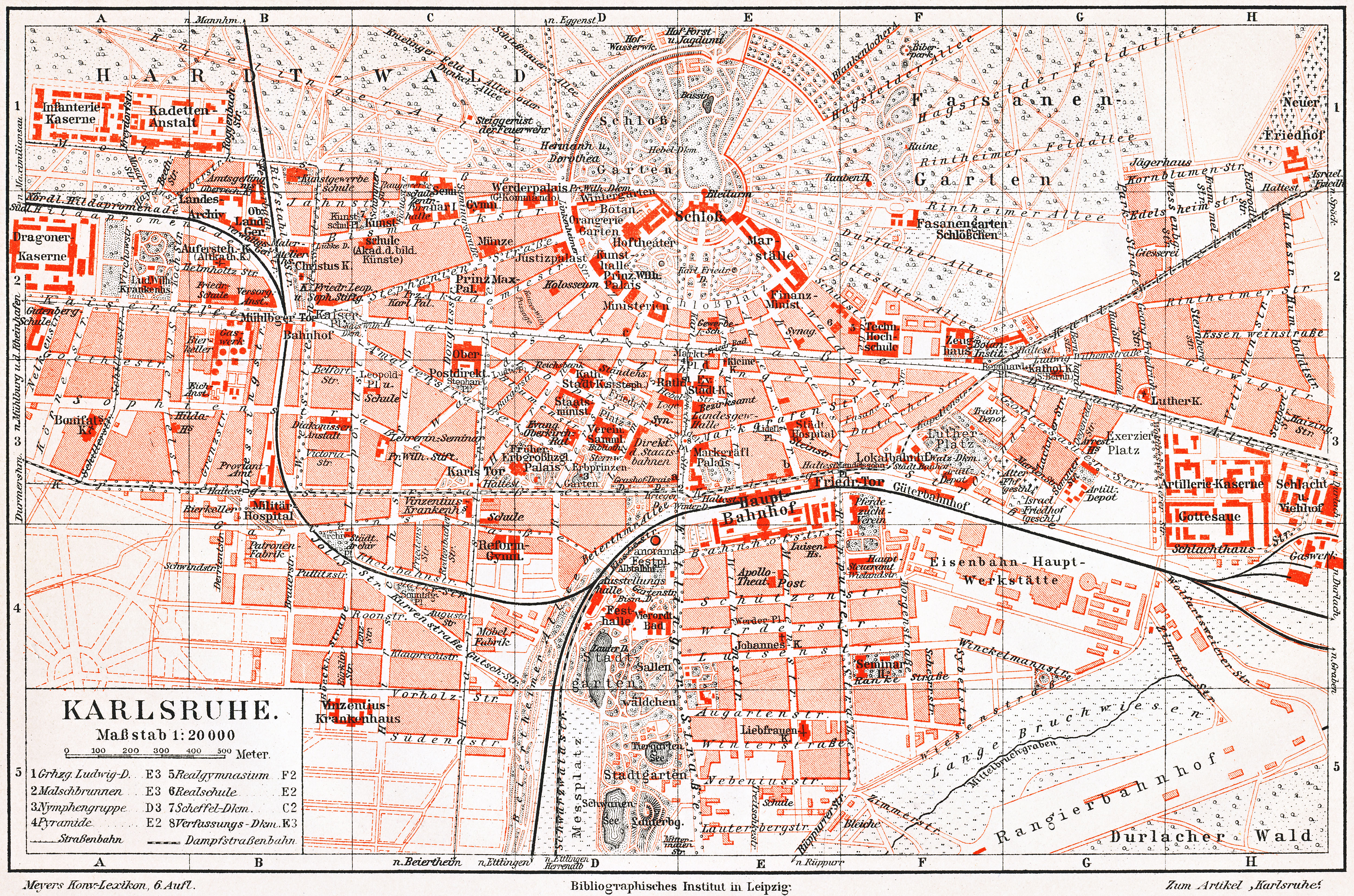 Karte der Stadt Karlsruhe aus dem Jahr 1906, dazugehöriges Straßenverzeichnis im Stadtwiki Karlsruhe vorhanden